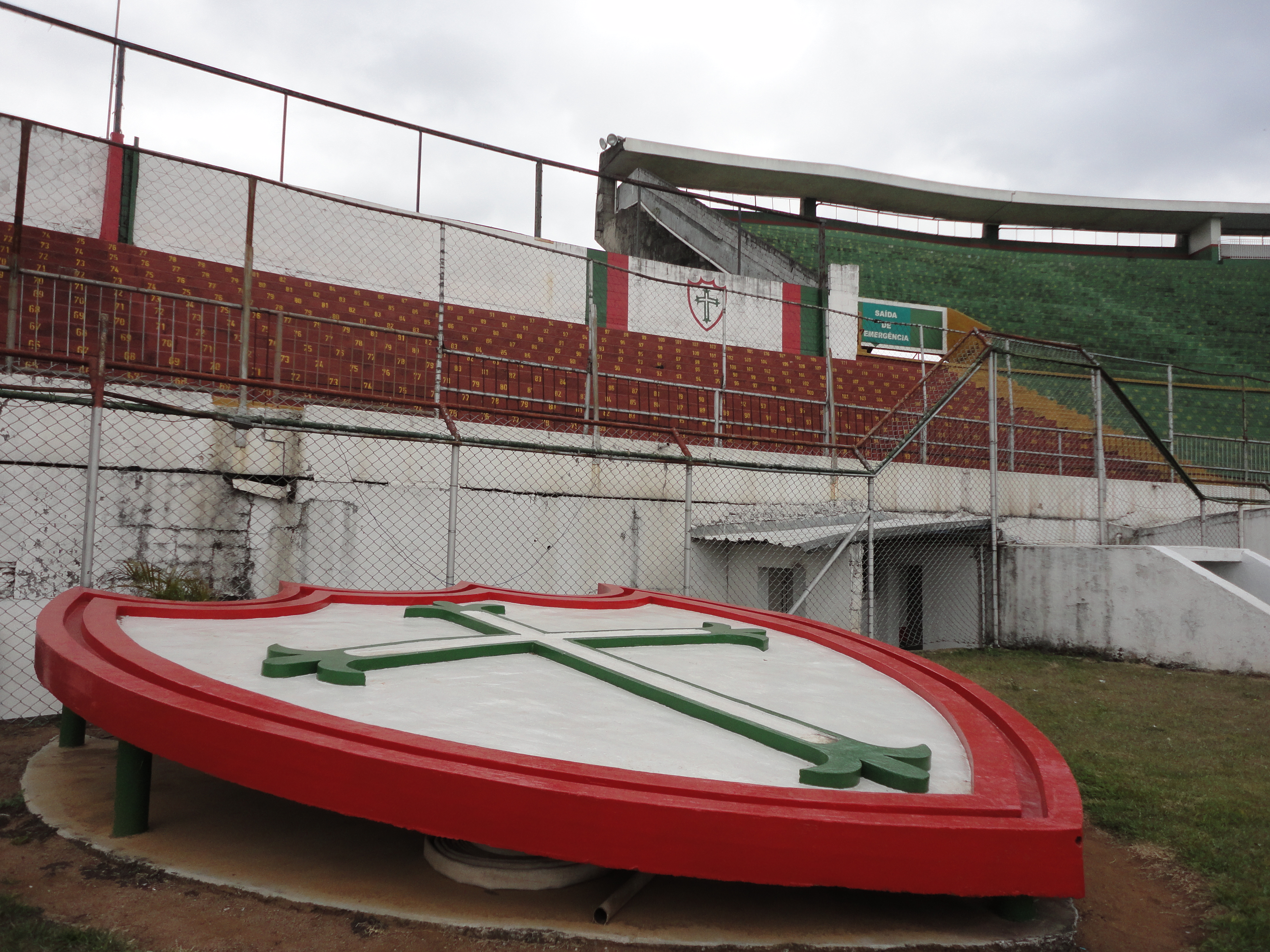 Detalhe de símbolo da Portuguesa no gramado do Canindé, em São Paulo, Brasil